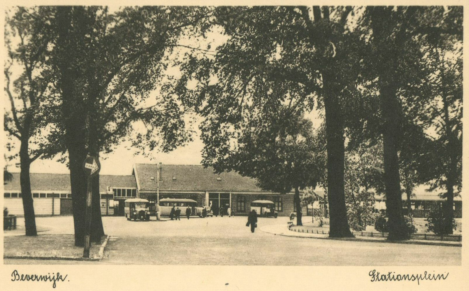 Gezicht op het N.S.-station Beverwijk te Beverwijk.